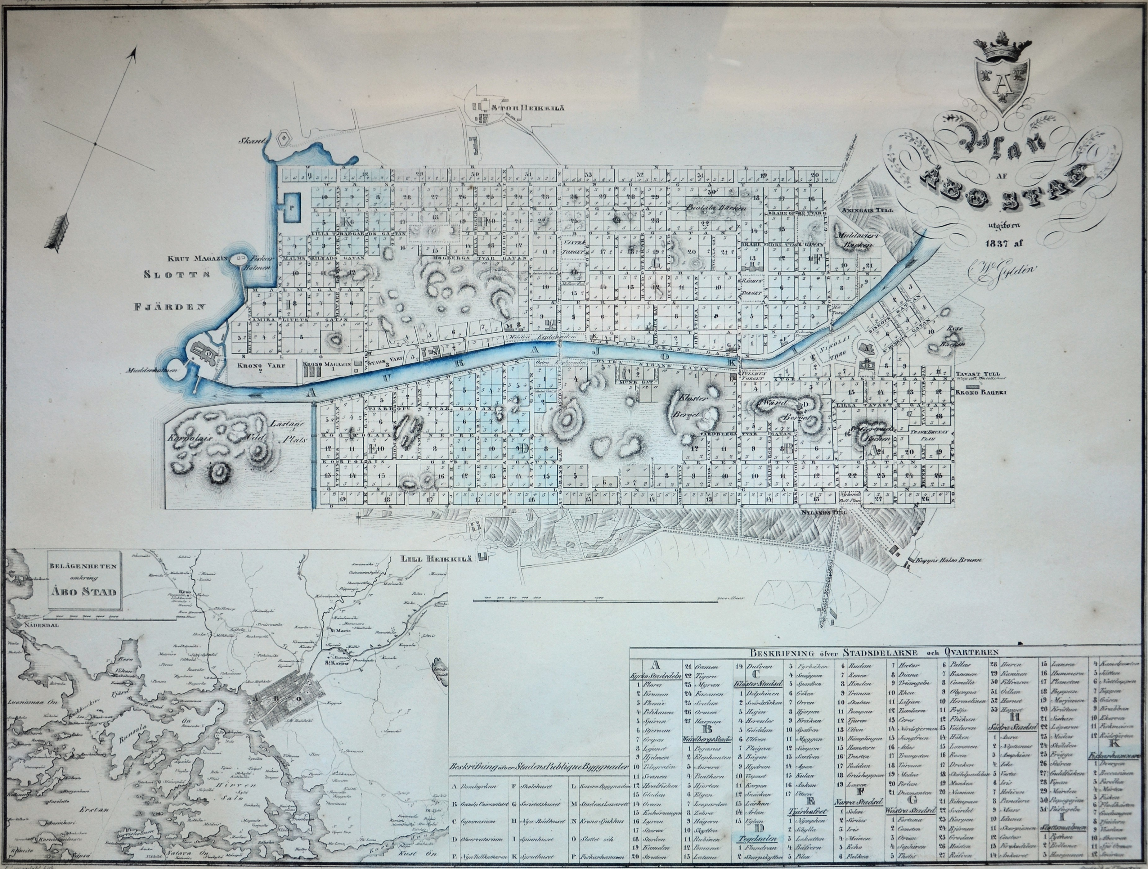 Plan af Åbo Stad utgifven 1838